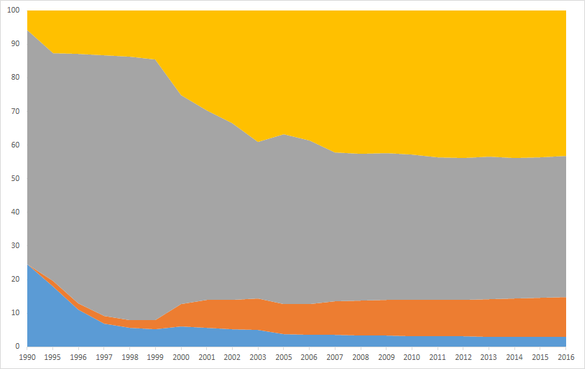 Розподіл земельних угідь за категоріями землевласників і землекористувачів України (у процентах від взаємних 100%). З 1990 по 2016 рр. Пропущені 1991-1994, 2004 рр. Землі запасу не включені.